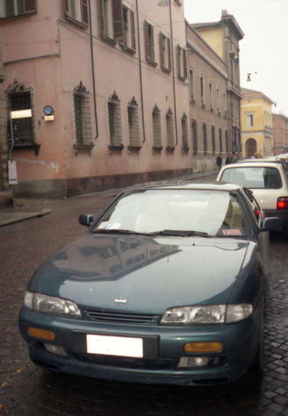 NISSAN240SX